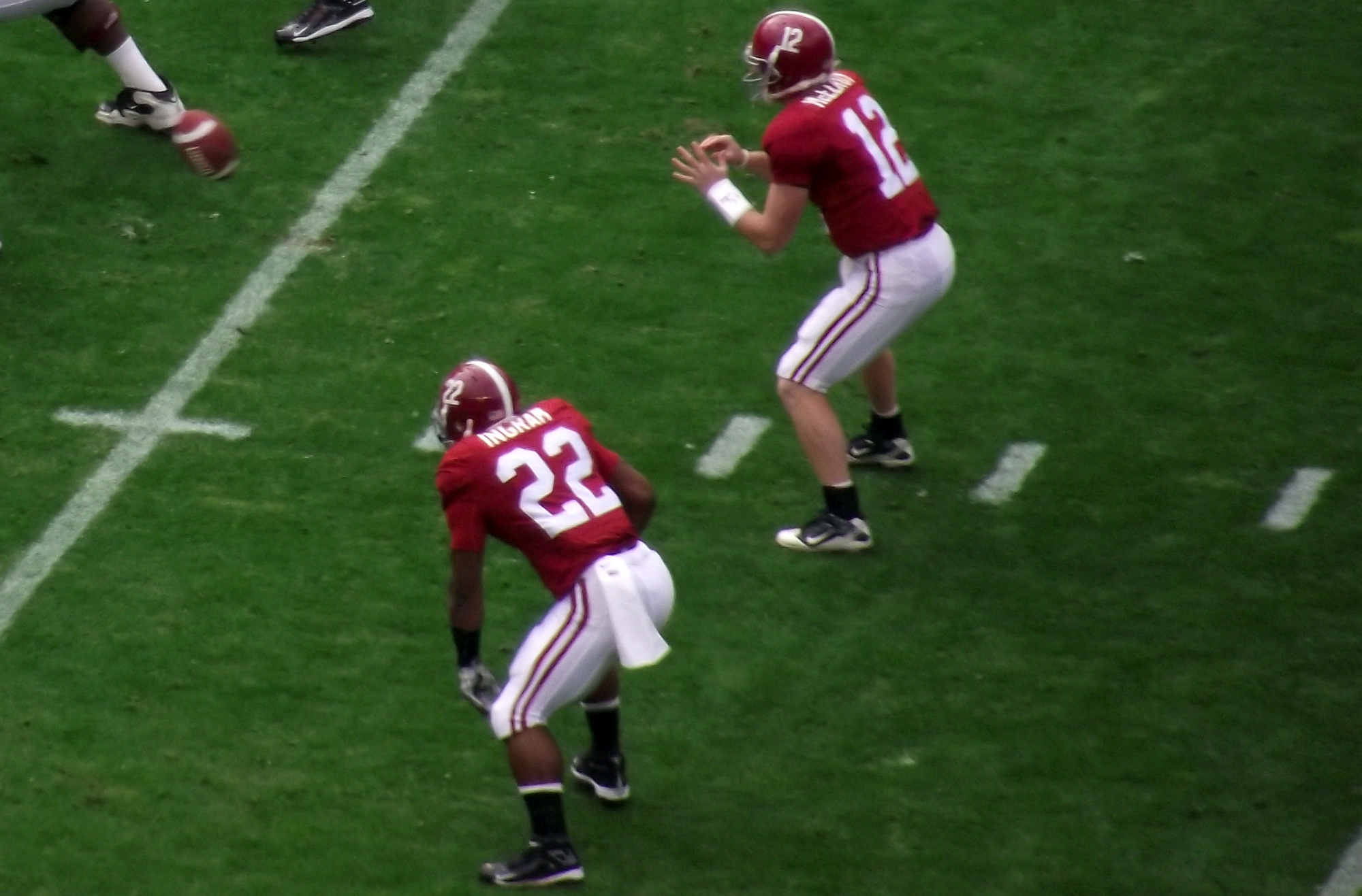 Alabama QB Greg McElroy and RB Mark Ingram, Jr.